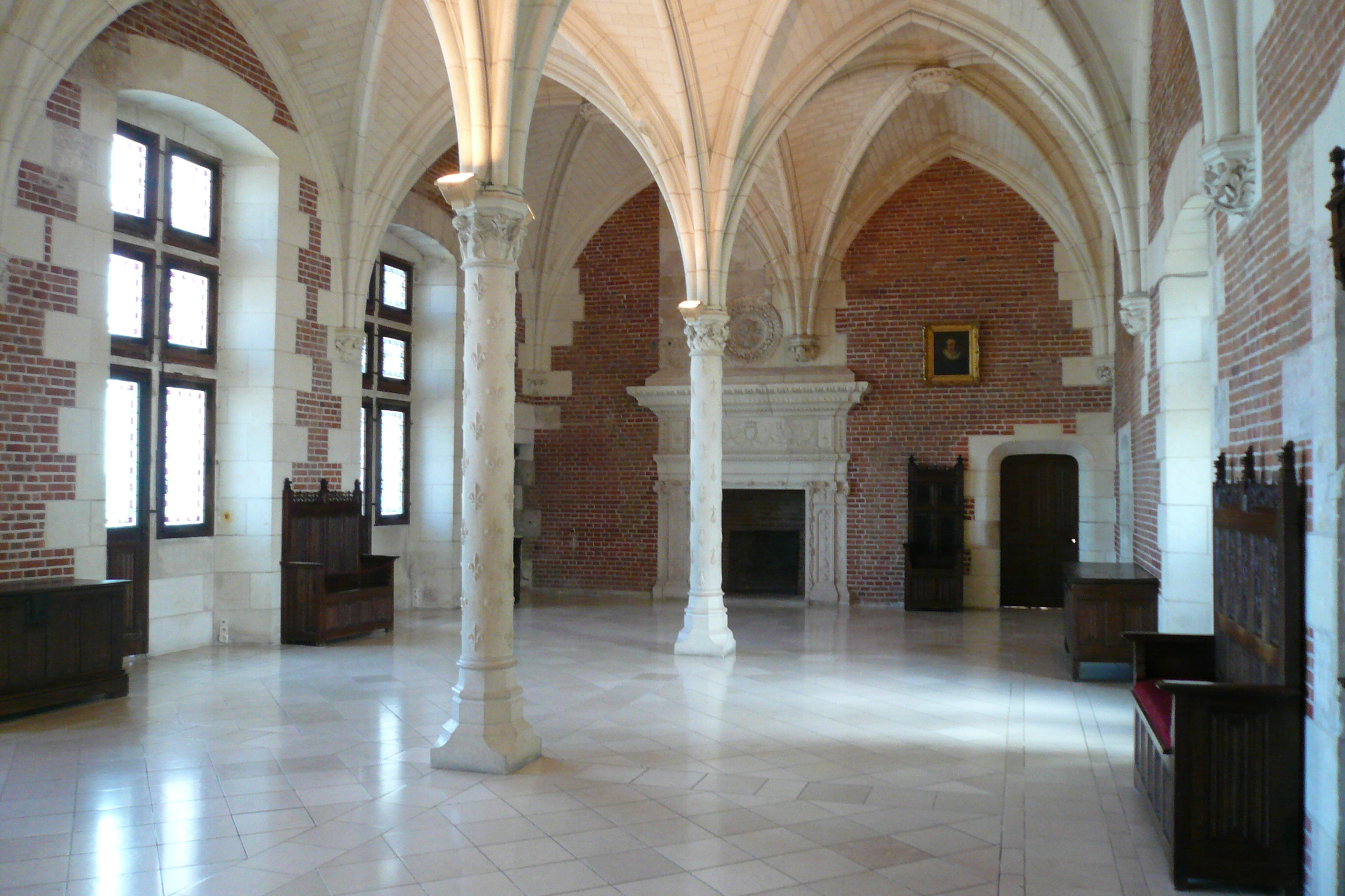 Grande salle du Château d'Amboise à Amboise, vallée de la Loire, France.